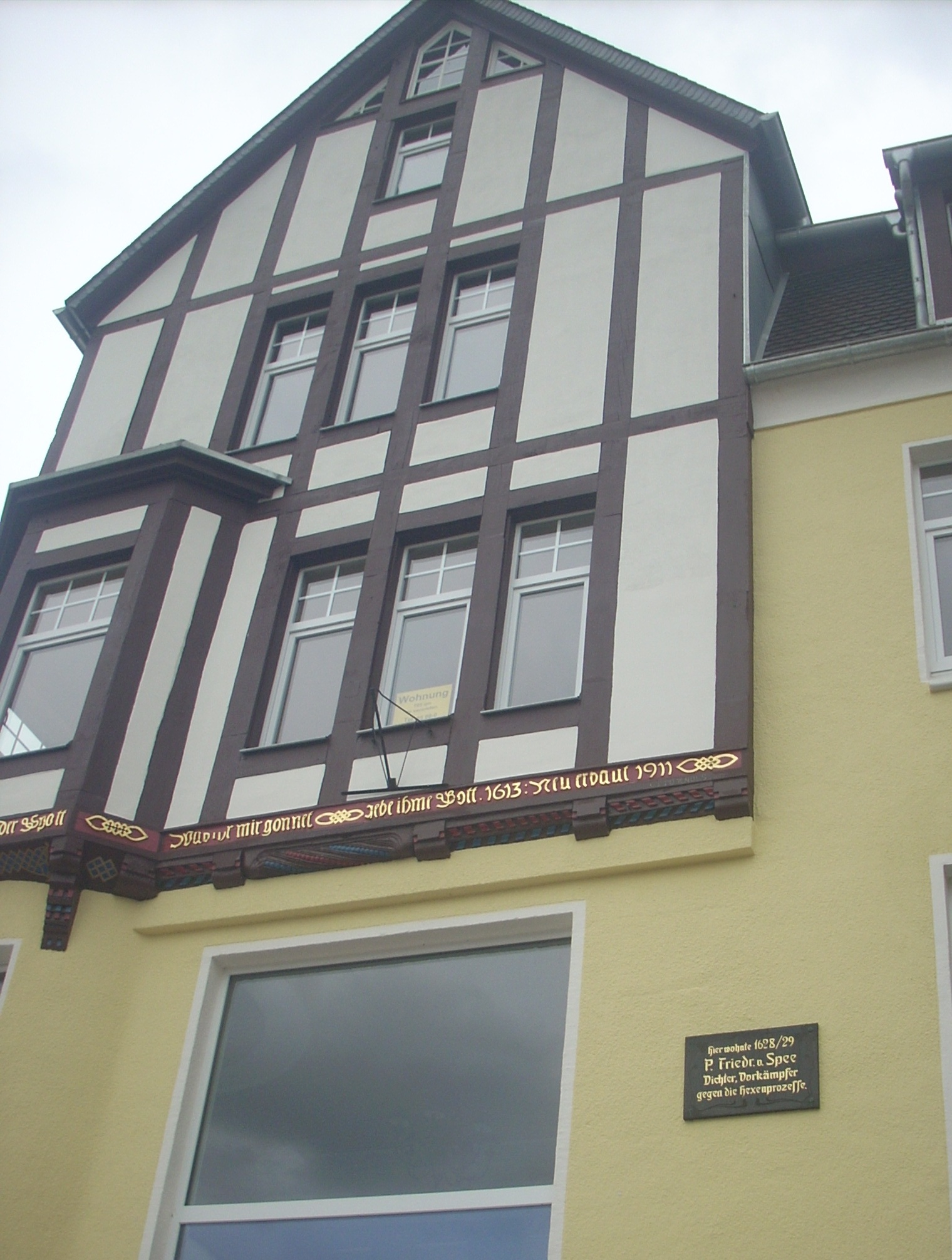 Peine, Marktplatz, Wohnhaus Friedrich von Spee 1628/29, Gedenktafel